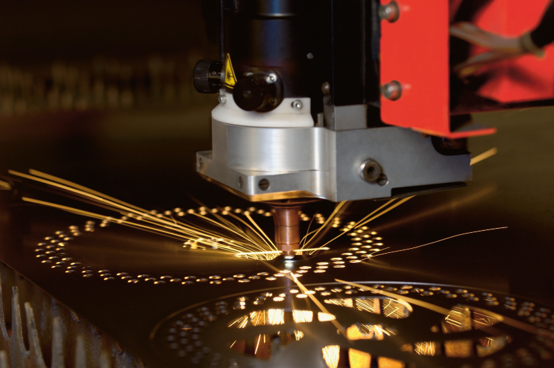 Bystronic Laserschneiden